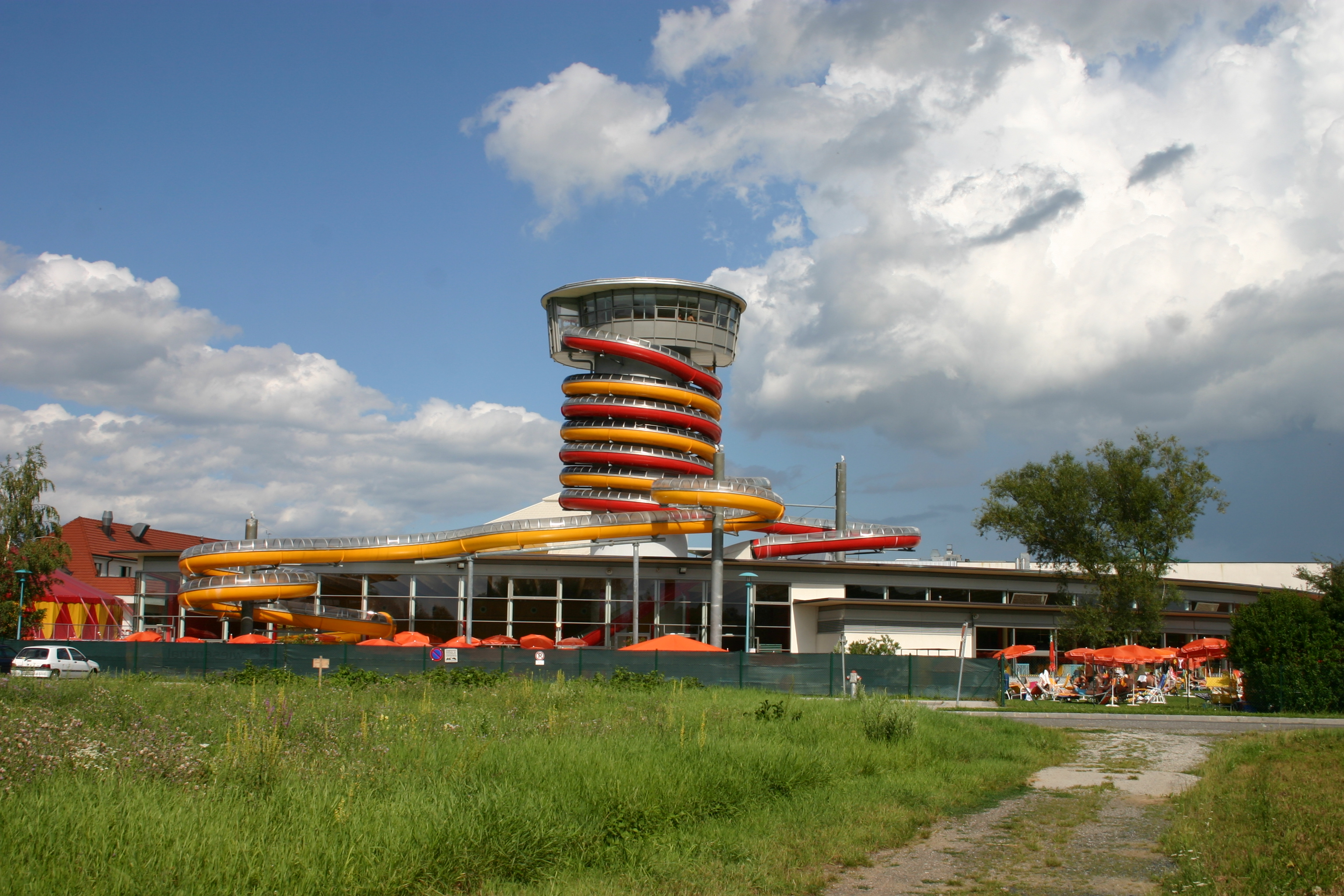 Lutzmannsburg Thermalbad